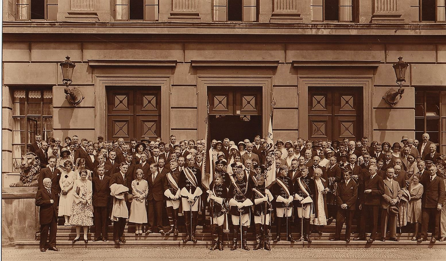 Bild vom 50.Stiftungsfest des VDSt Halle-Wittenberg vor dem Löwengebäude, dem Hauptgebäude der Martin-Luther-Universität Halle-Wittenberg